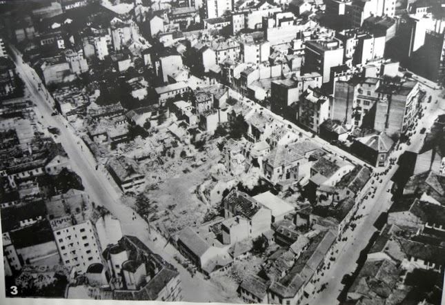 Фотографије бомбардованог Београда 06. 04. 1941. и улазак окупатора у Београд априла 1941.